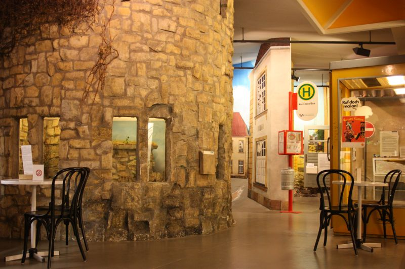 Ein Teil der Daueraustellung "Lebensraum Stadt" des Museums am Schölerberg Osnabrück.